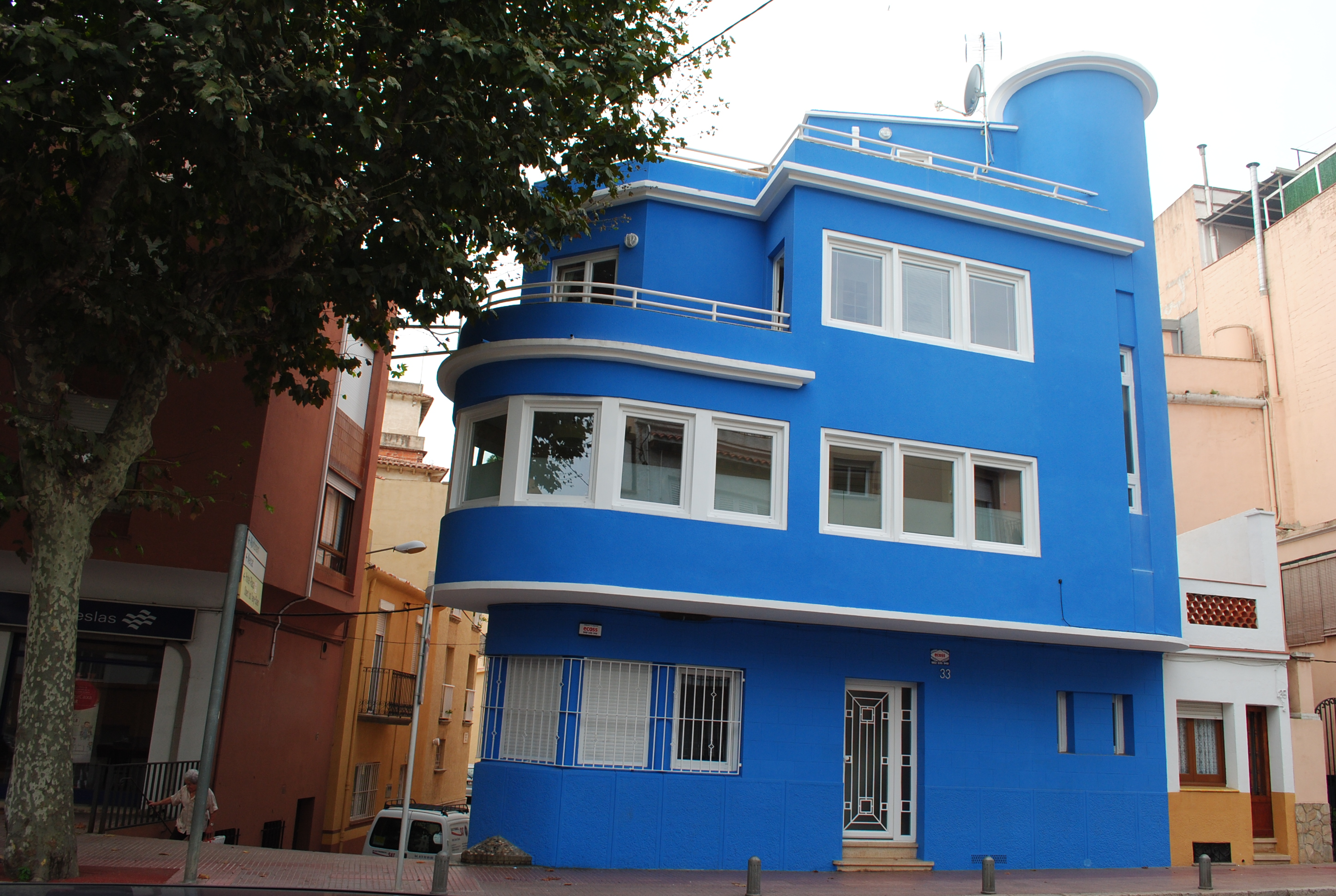 Casa Dawson (Sant Feliu de Guíxols), 1941, és una obra racionalisme de l'arquitecte Joan Bordàs i Salellas